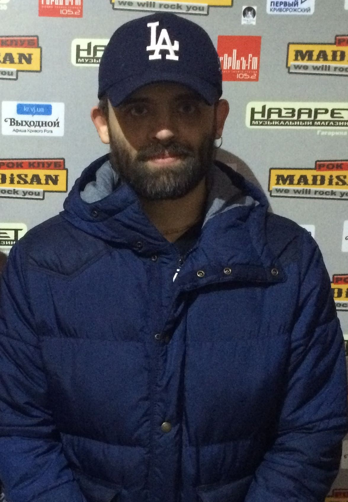 Переверзєв Василь після концерту, Кривий Ріг 4 березня 2017 року.